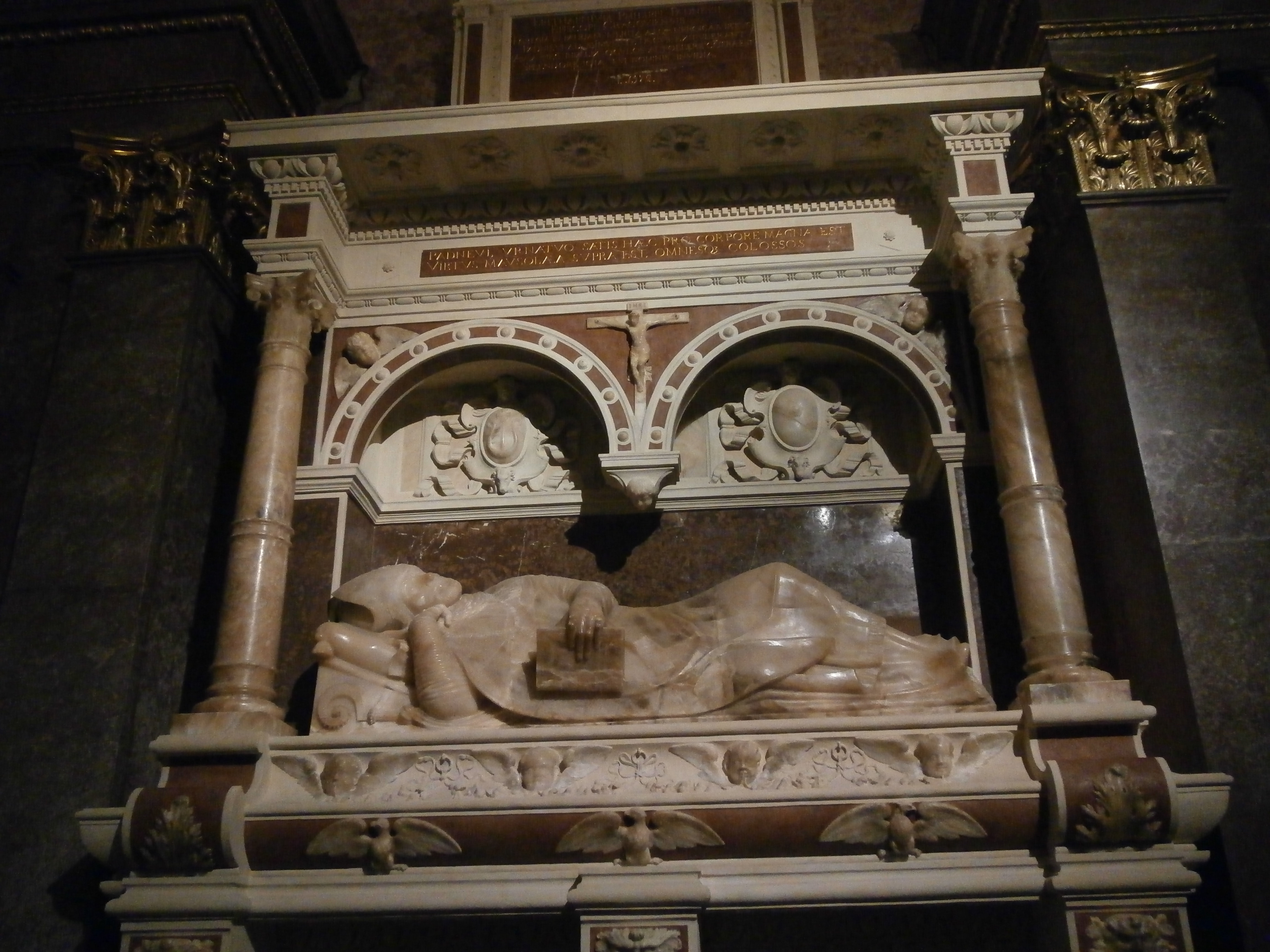 Nagrobek bpa Filipa Padniewskiego w Katedrze Wawelskiej w Krakowie.